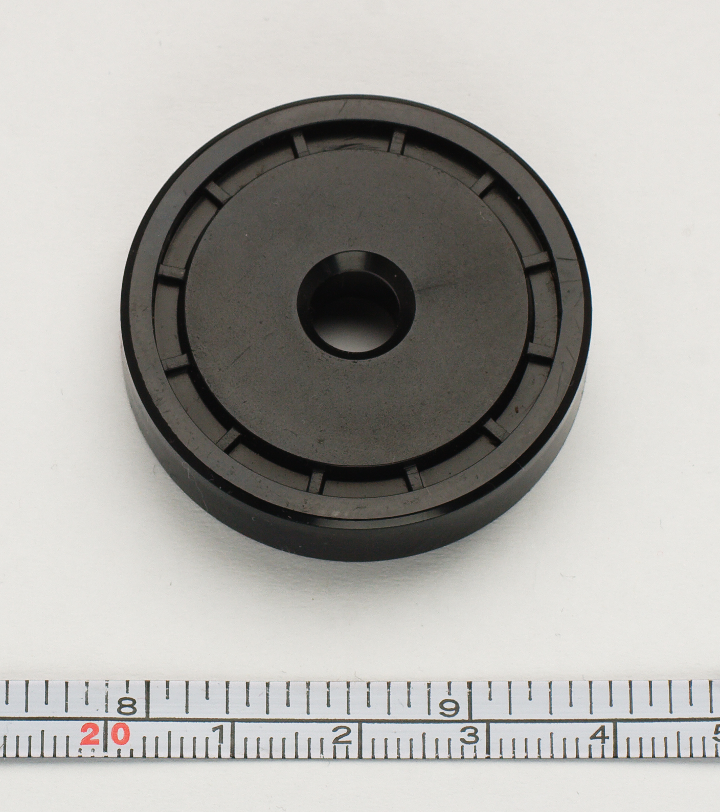 Oberseite eines Pucks. Es handelt sich um einen Adapter zum Abspielen von Singles auf Plattenspielern. Dieses Exemplar aus Plastik stammt von Anfang der 1990er Jahre (mitgeliefertes Zubehör für den Plattenspieler eines Universum-Stereoturms). Die Skala zeigt oben Zoll (Inch) und darunter Meter.